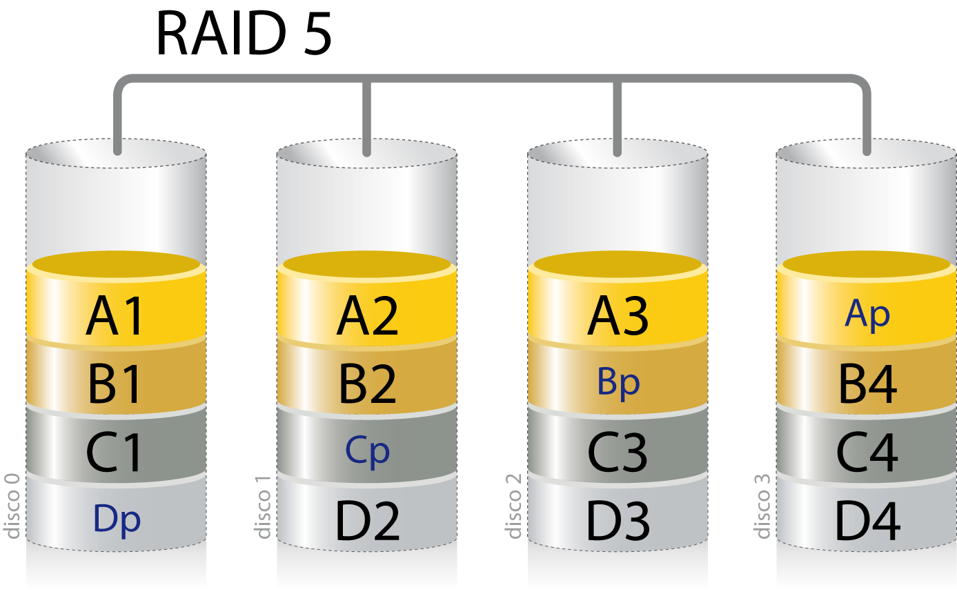 Esquema RAID 5